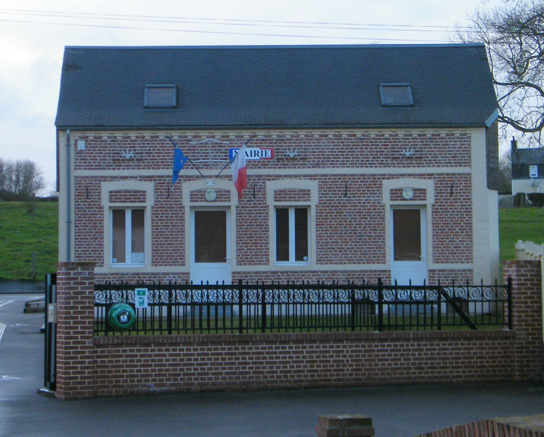 Mairie.